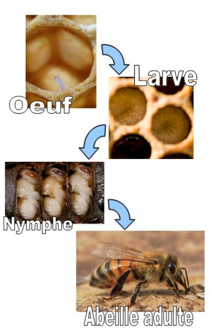 Schémas représentant le cycle dune abeille, de l'oeuf a l'abeille adulte.